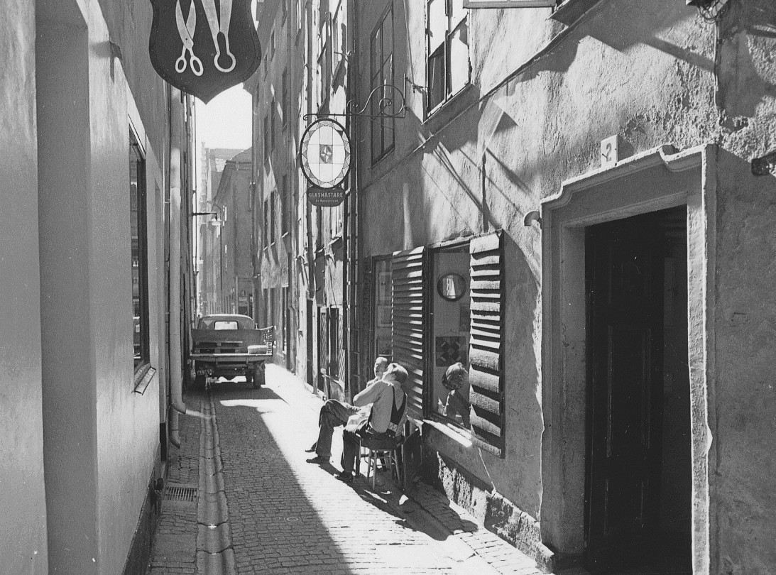 Yxsmedsgränd nr 2 med Bo Augustssons glasmästeri